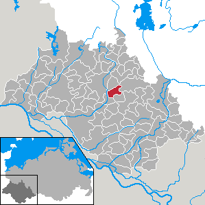 Moraas in Mecklenburg-Vorpommern - district Ludwigslust